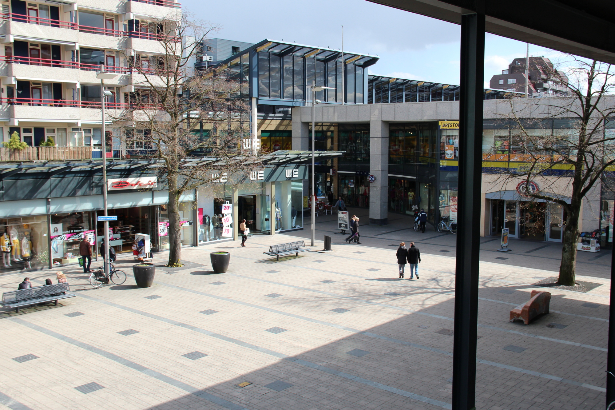 Winkelcentrum de Weiert